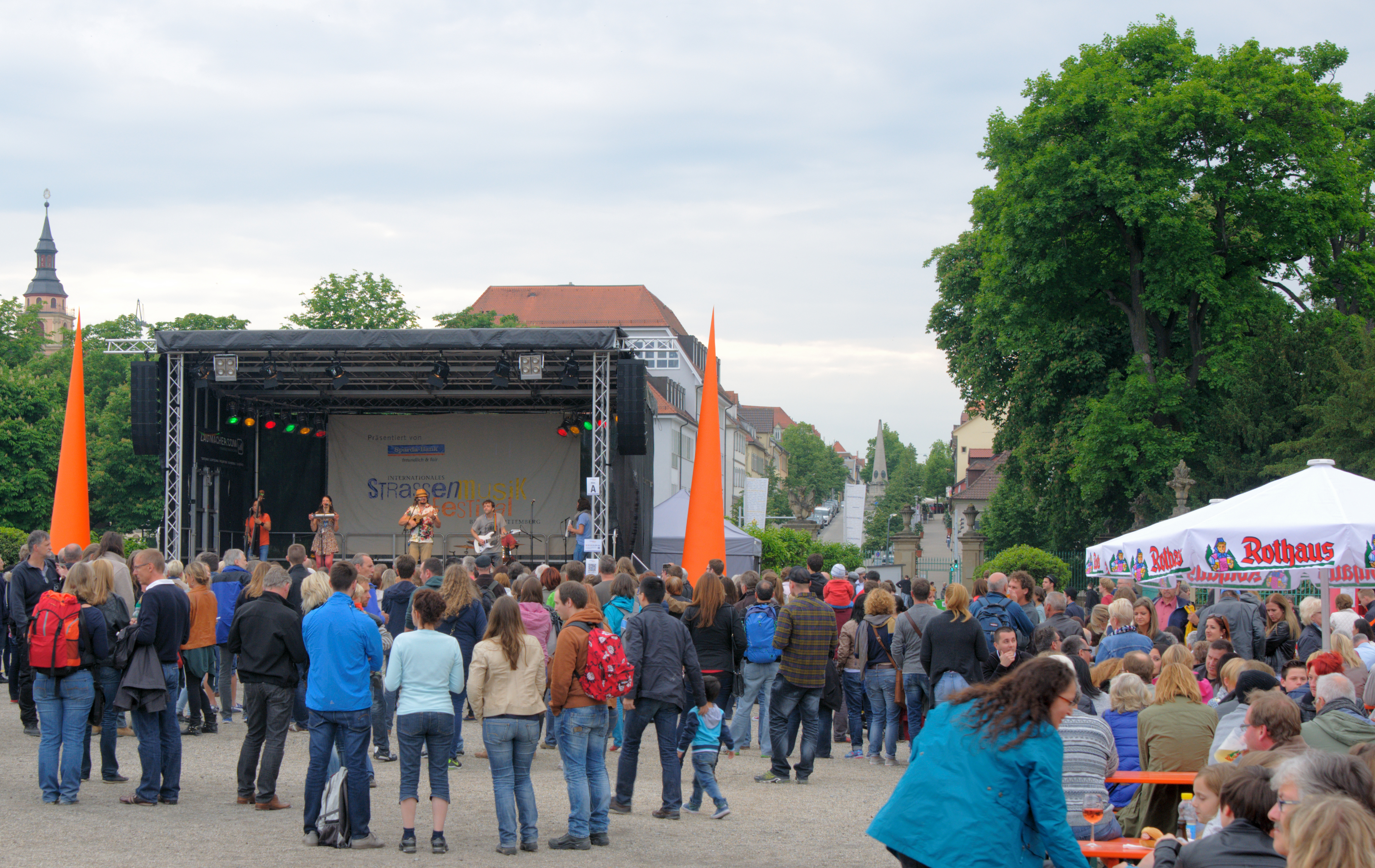 Internationales Straßemmusikfestival Baden-Württemberg,2015